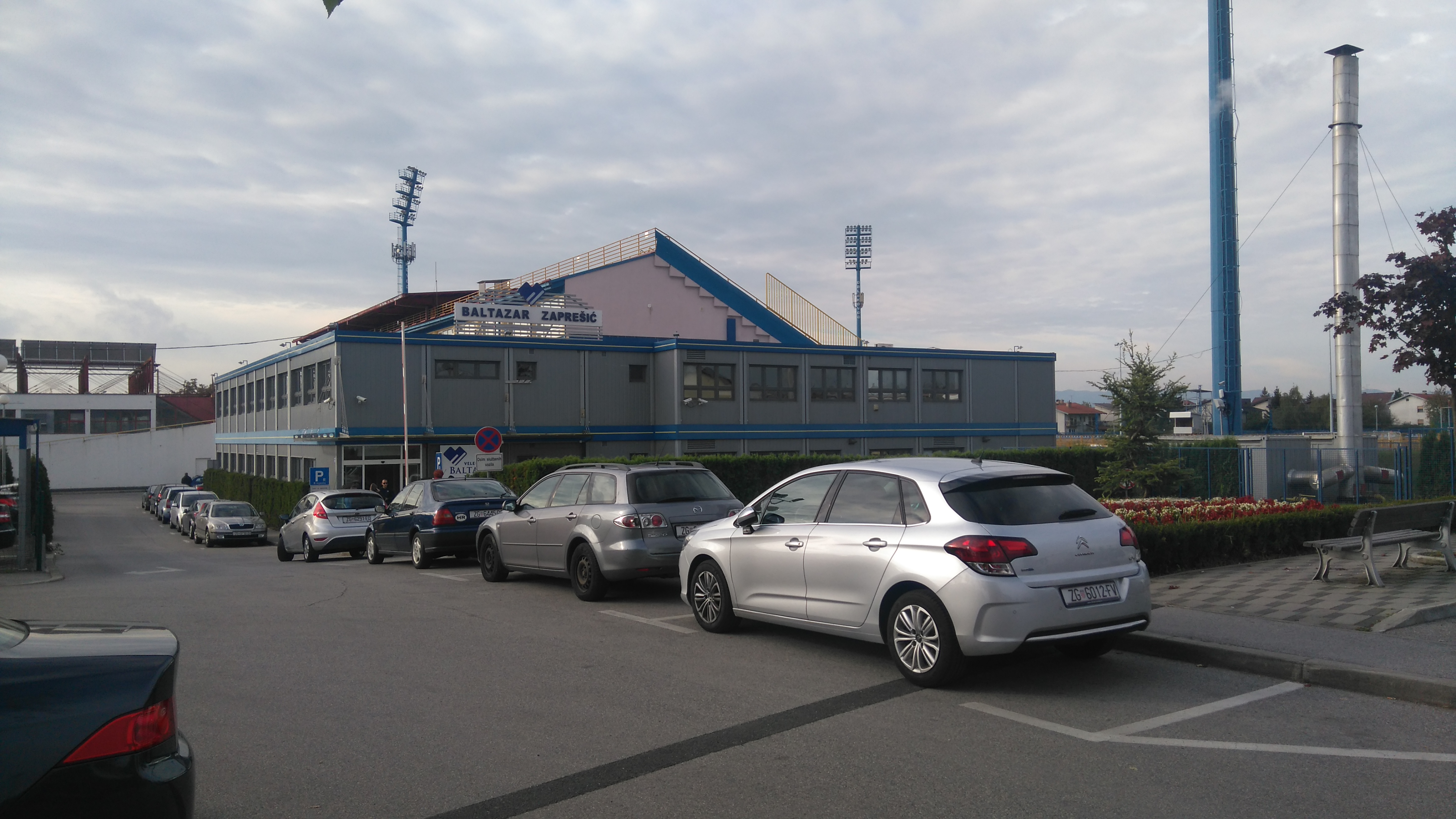 Pogled na prostorije veleučlišta